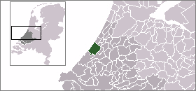 Locatie gemeente Wassenaar. Afbeelding gemaakt door gebruiker:Mtcv en vrij te gebruiken.